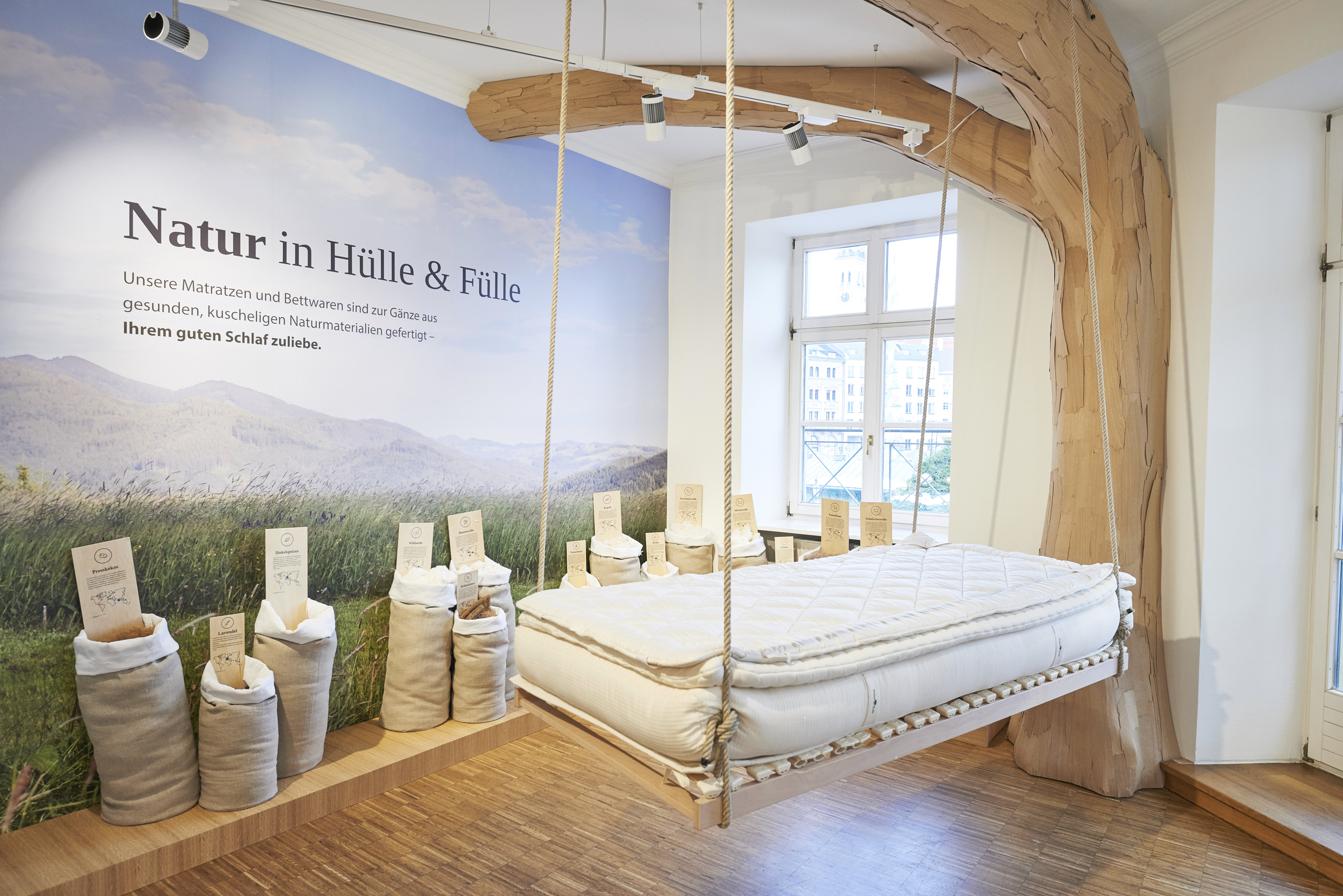 Die neu gestaltete Schlafwelt im Grüne Erde-Shop München